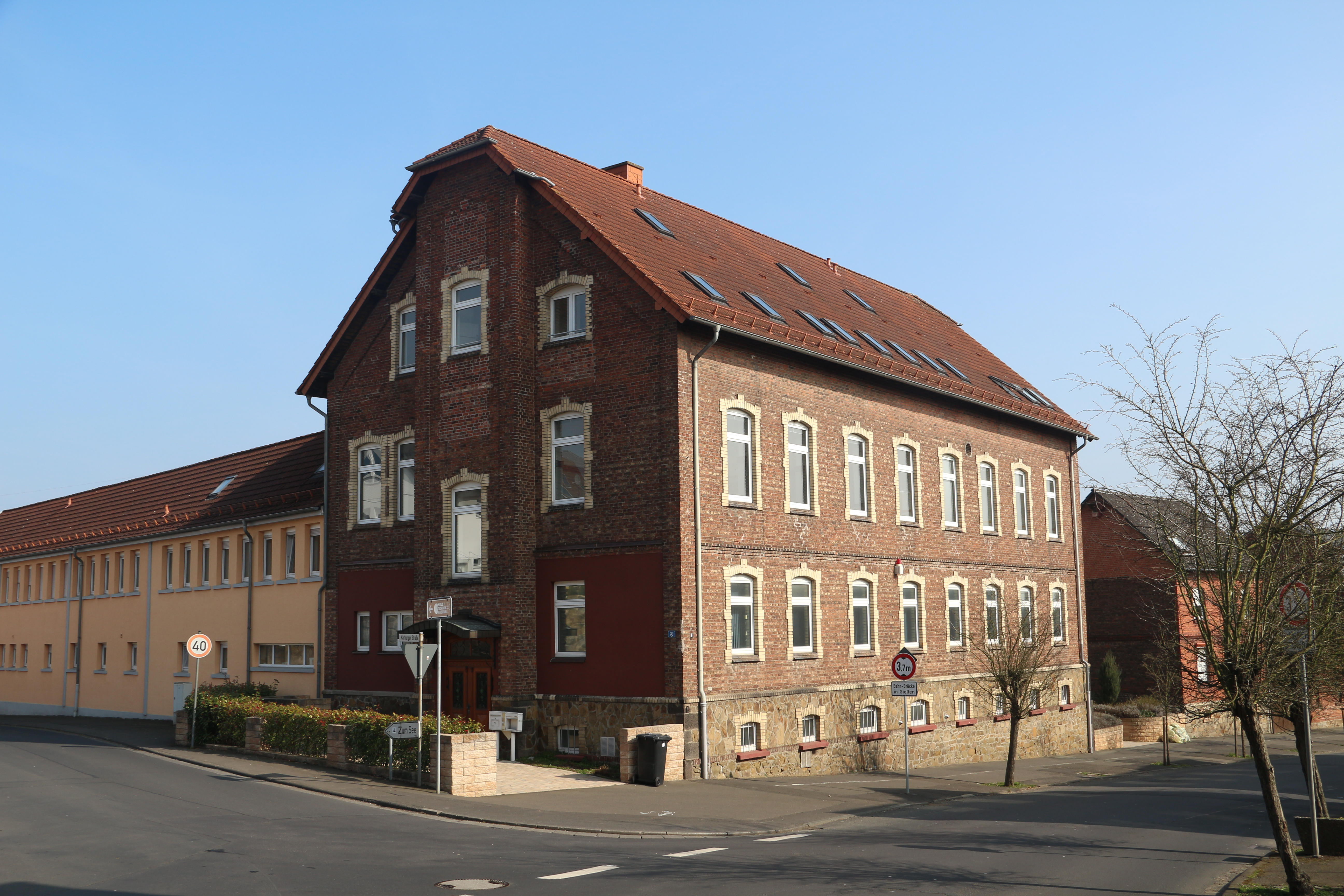 Wißmar